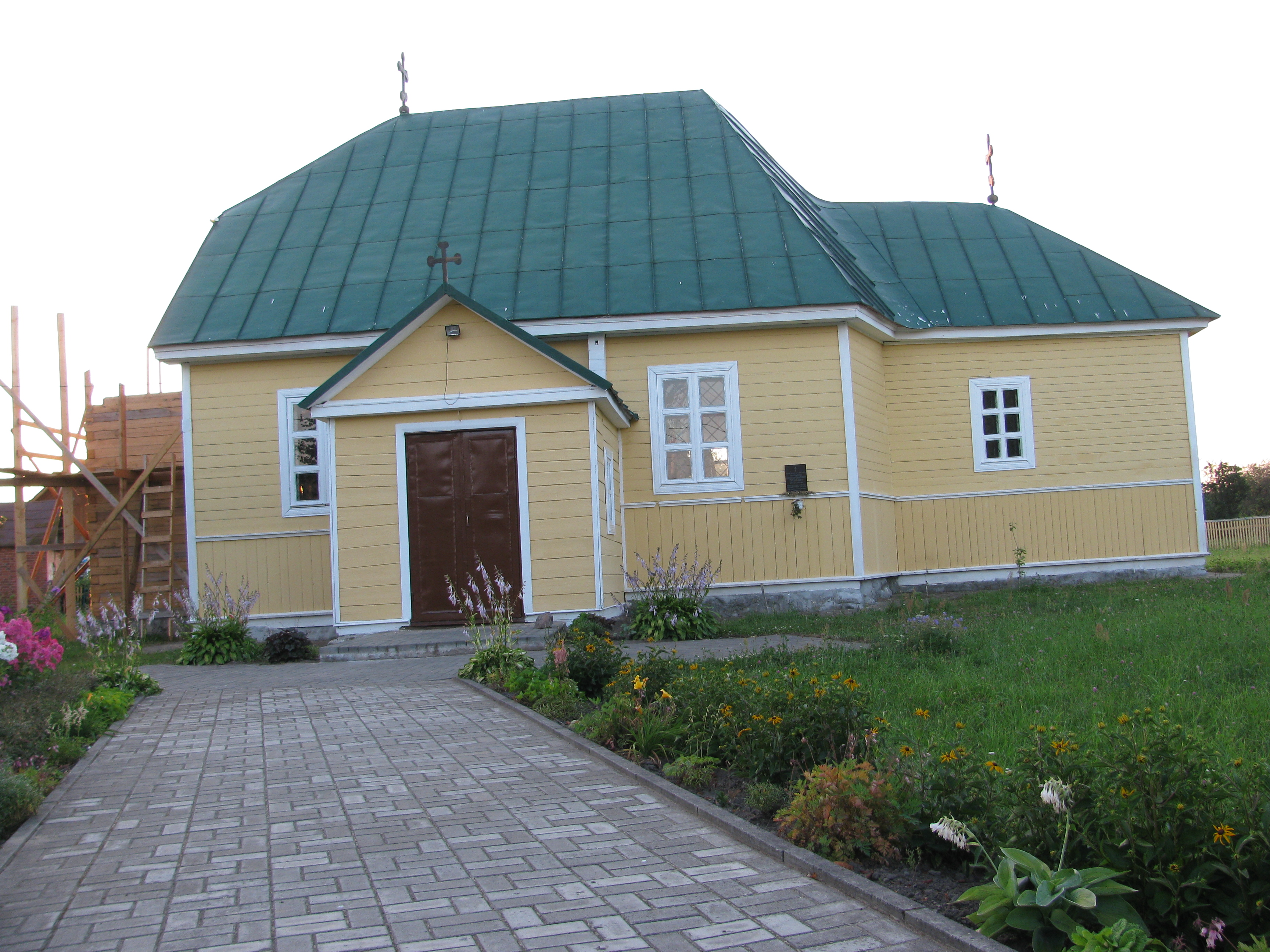 Храм Преображения Господня п. Копысь